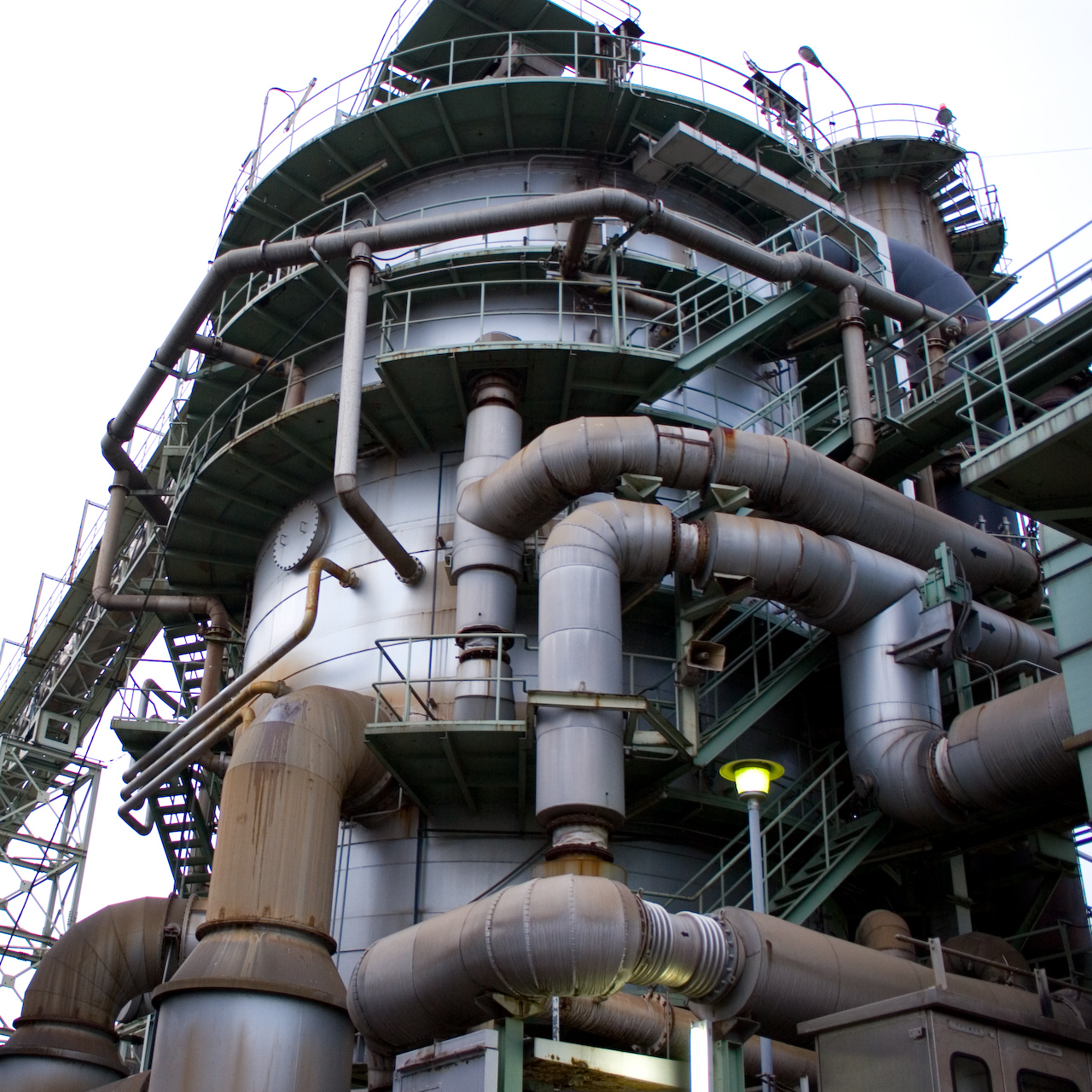 @城南島